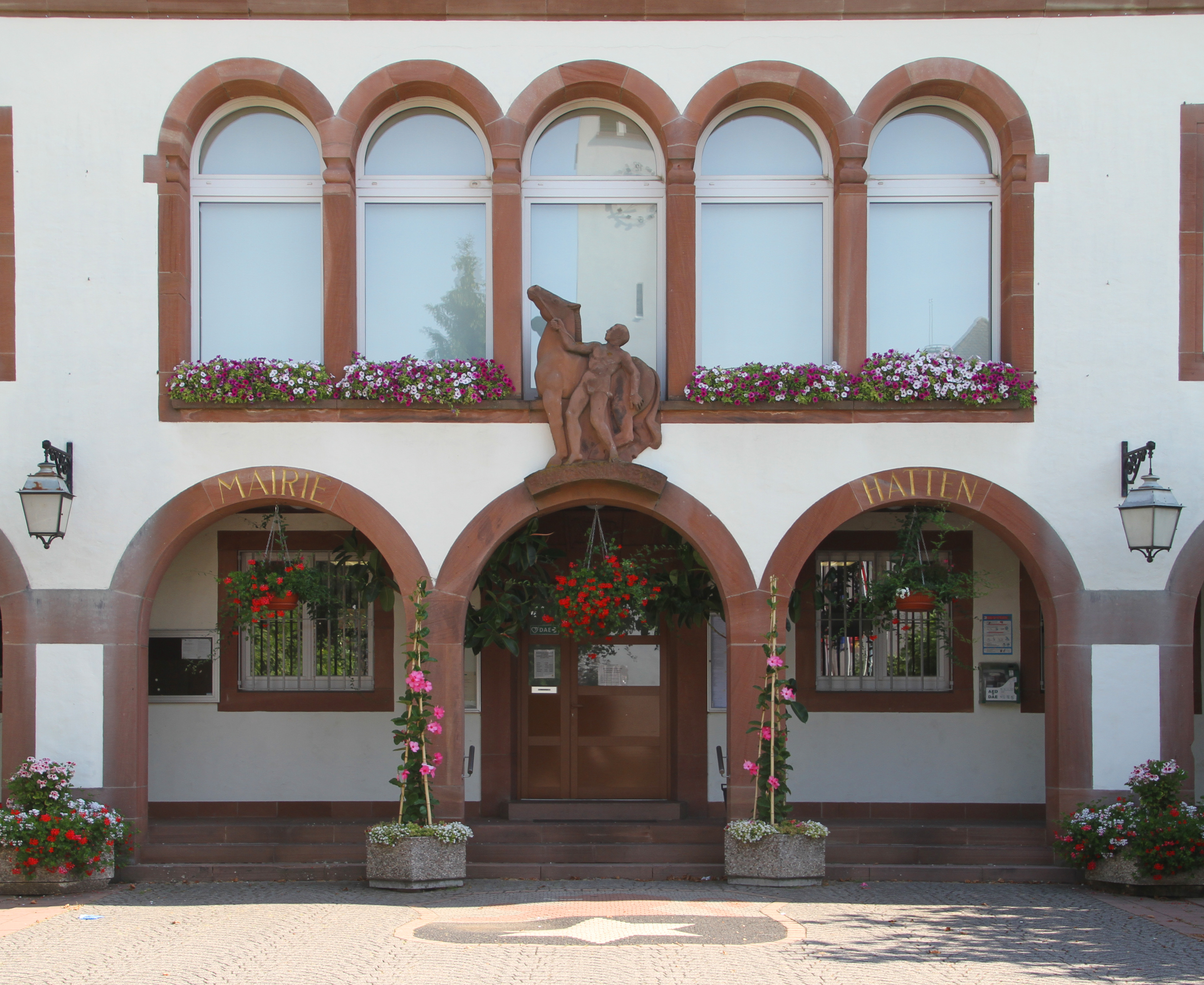 Hatten (Bas-Rhin)